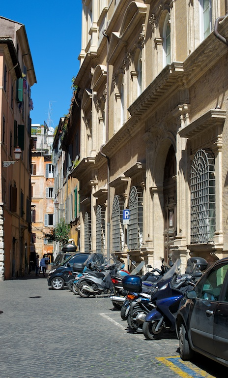 KAM_0397